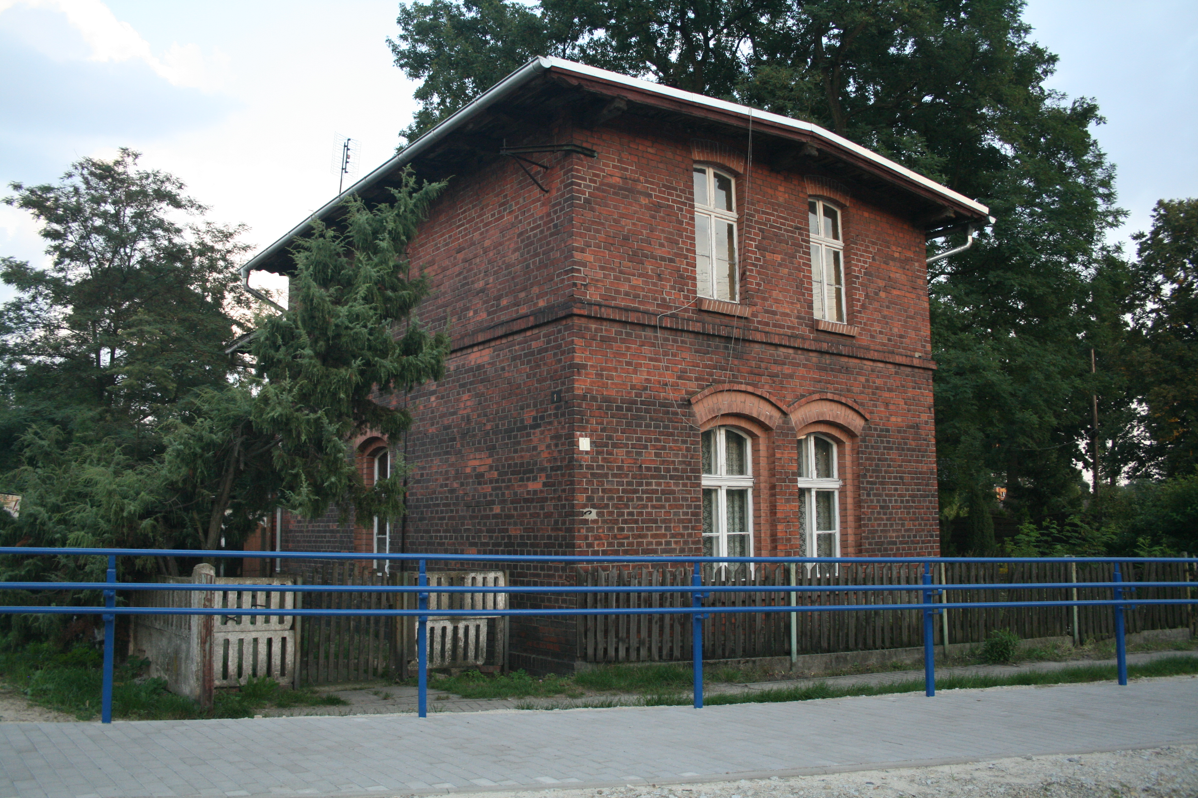 Dawny budynek stacji kolejowej, obecnie budynek mieszkalny